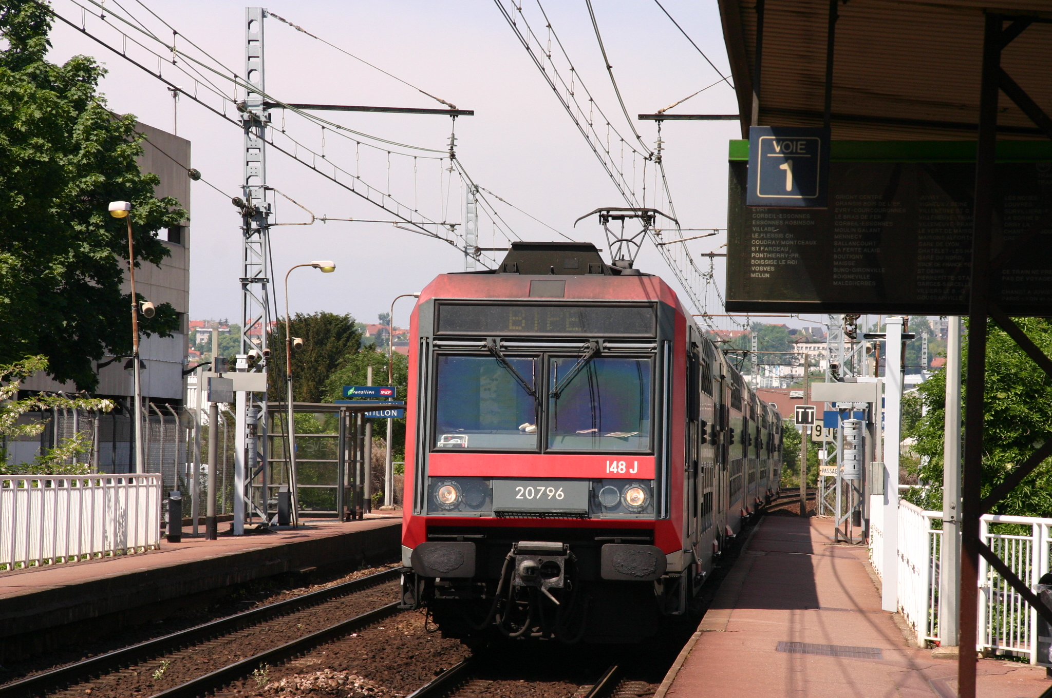 La Gare de Viry-Châtillon, Viry-Châtillon , département l'Essonne, France